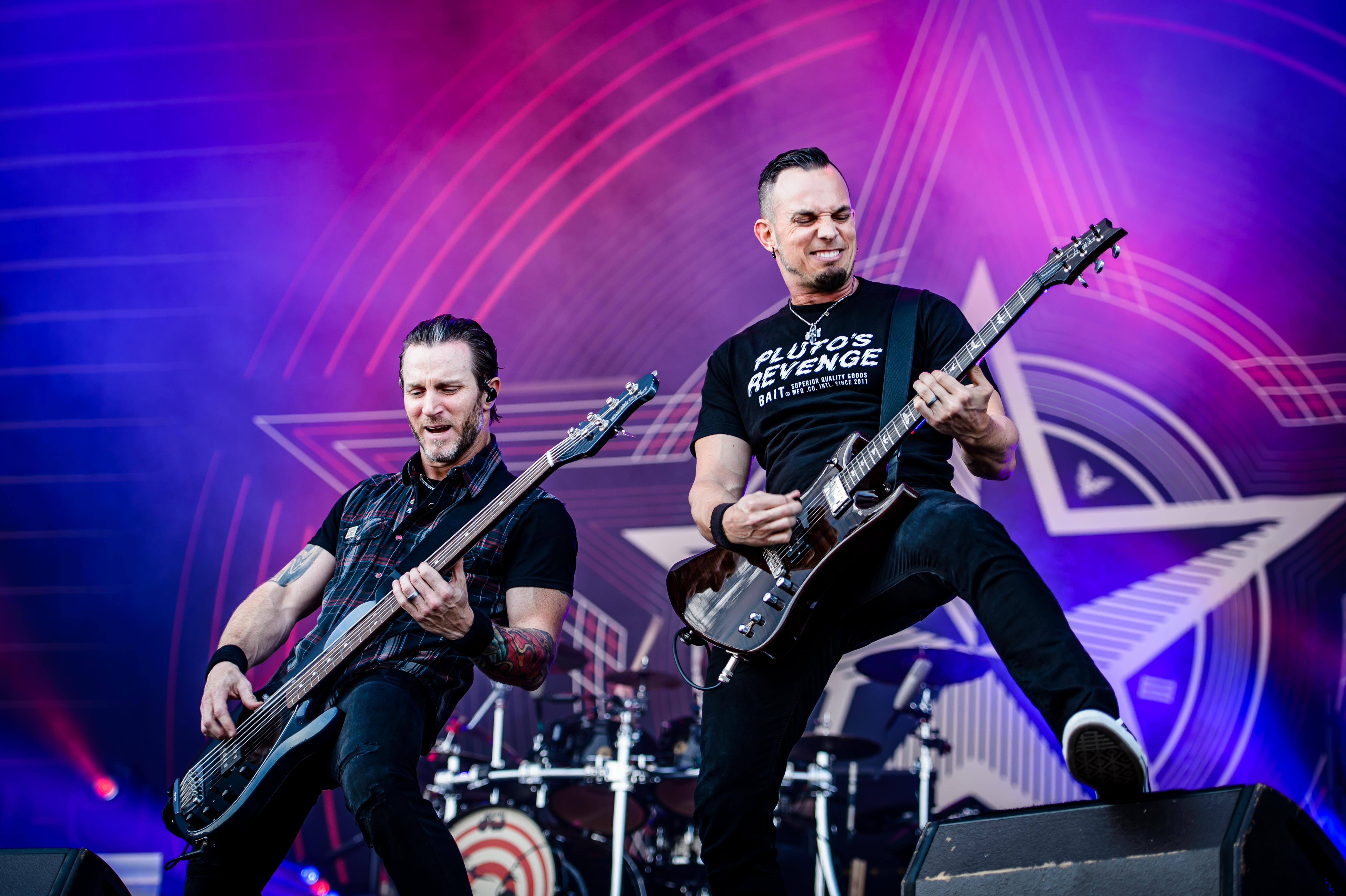 'Rock im Park 2017; Nürnberg': 'Alter Bridge'